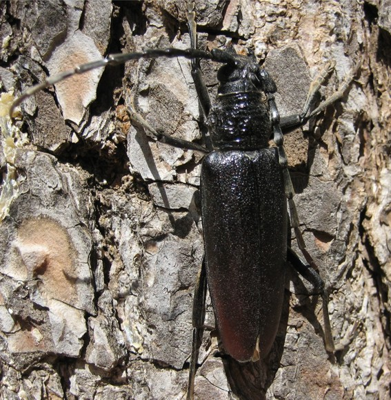 Cerambyx cerdo sobre un árbol